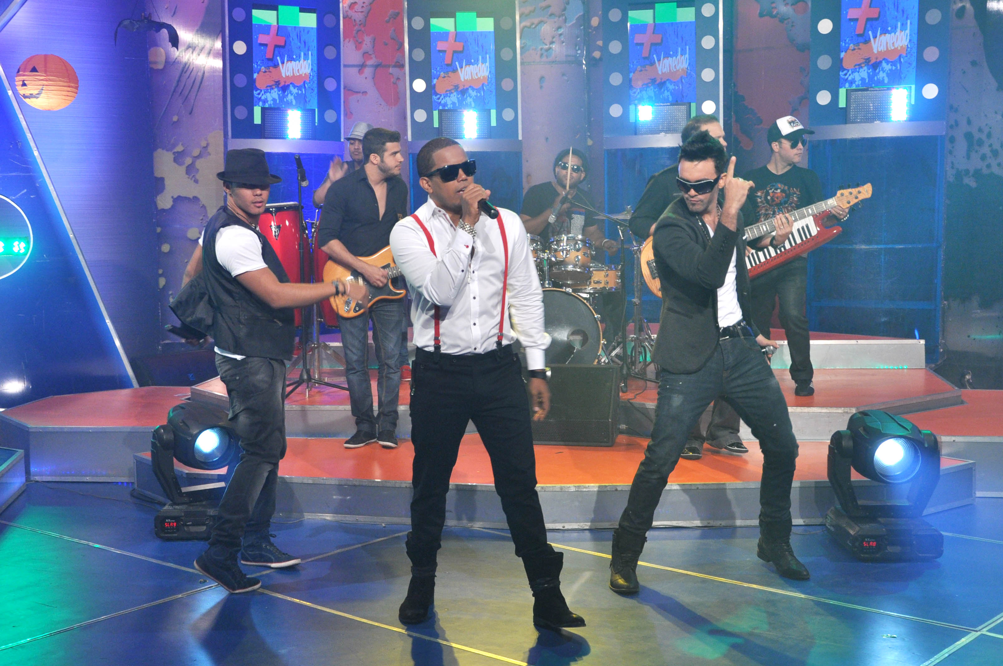 Ilegales, agrupación musical dominicana.